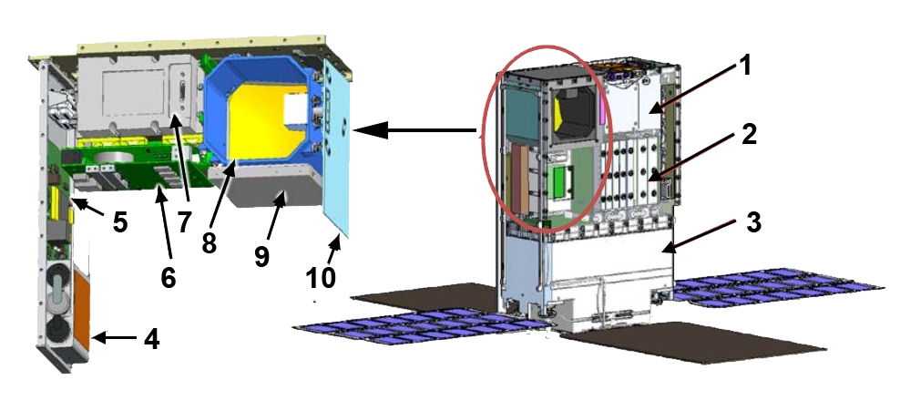 Lunar Flashlight CubeSat Reflectometer witthout labels